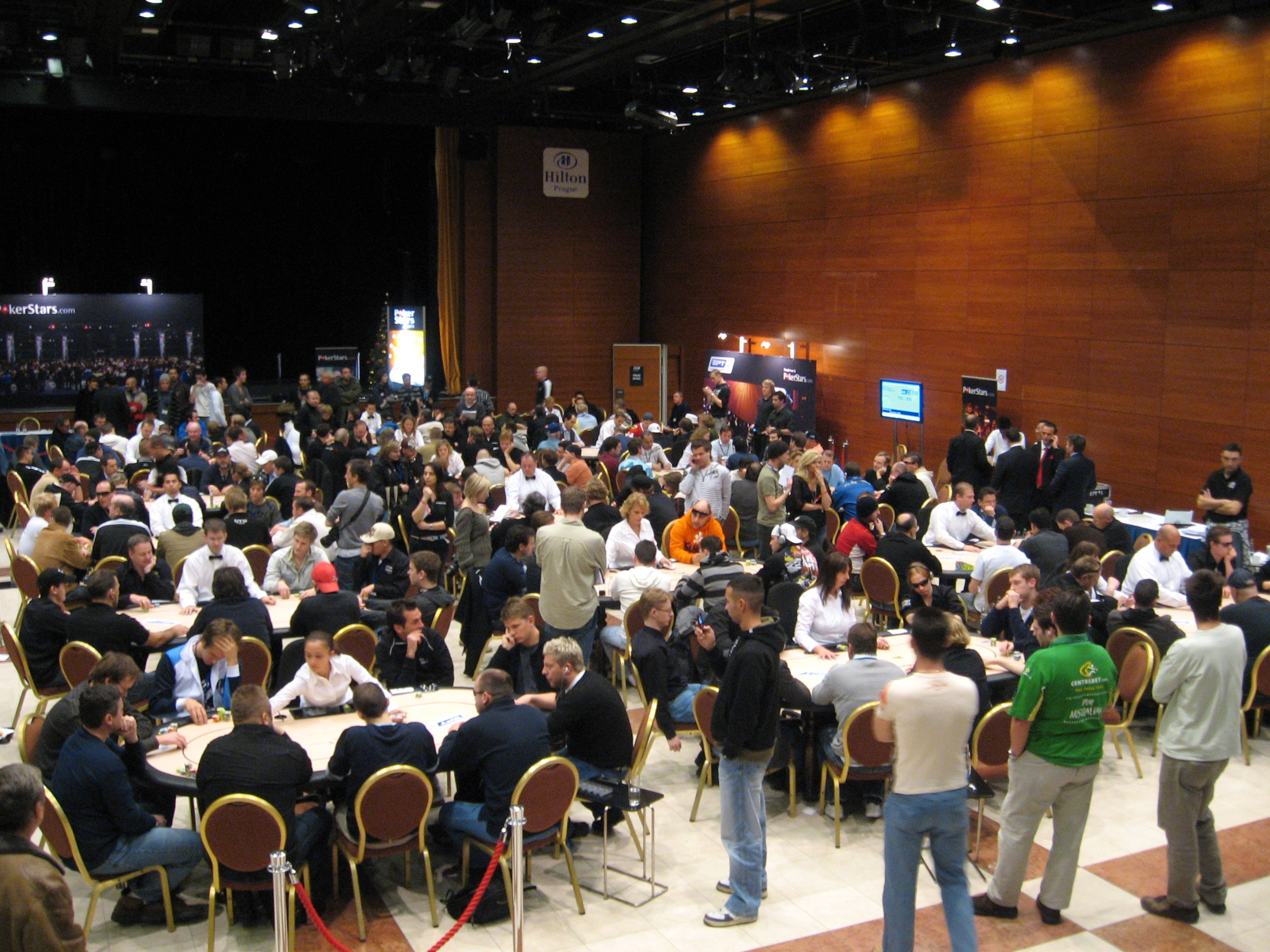 Die European Poker Tour im Hilton Prague Hotel 2007